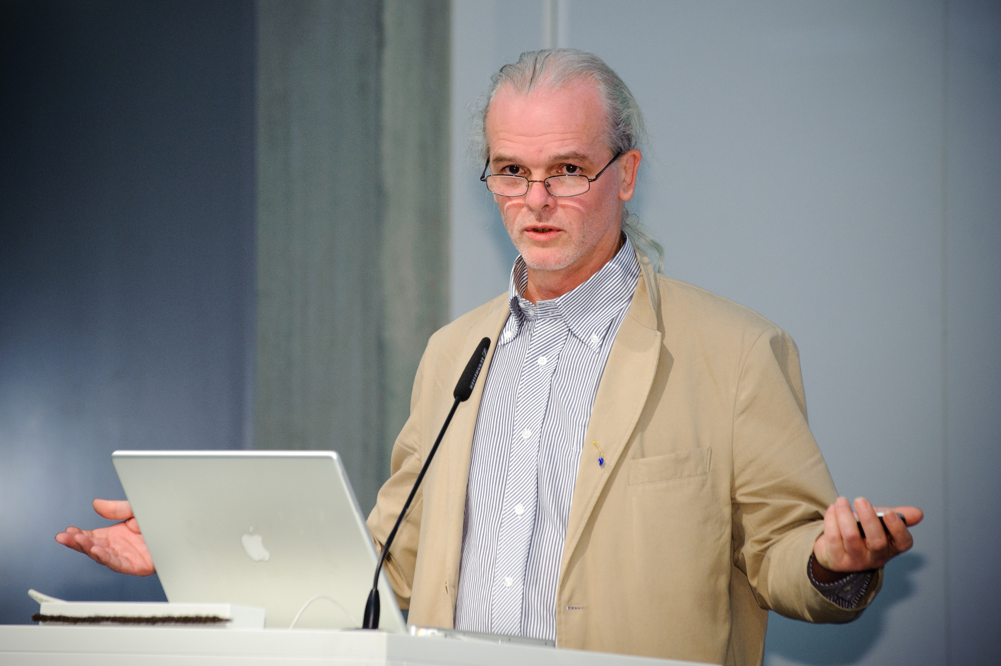 Foto: CC-BY-SA Stephan Roehl / Heinrich-Böll-Stiftung Energiewende mit Atom Mythos oder Notwendigkeit? am 30.09.2010 Durch die gerade beschlossene Laufzeitverlängerung der 17 deutschen Atomkraftwerke ist die Diskussion um die Atomkraft neu entbrannt. Die Regierung meint, Atom sei eine notwendige Brückentechnologie zur Versorgung aus Erneuerbaren Energien. Mycle Schneider, international tätiger Energie- und Atomexperte, hält das in seinem Beitrag für die Publikation der Heinrich-Böll-Stiftung Mythos Atomkraft – ein Wegweiser für einen Mythos: Atomkraft sei keine Brücke, sondern blockiere im Gegenteil den Ausbau Erneuerbarer Energien. Anlässlich der Aktualisierung und Ergänzung der Publikation Mythos Atomkraft hat die Heinrich-Böll-Stiftung Wissenschaftler und Politiker eingeladen, um das Für und Wider einer Laufzeitverlängerung zu diskutieren. Mit: Dr. Dietmar Lindenberger, Geschäftsführer amEnergiewirtschaftlichen Institut an der Universität zu Köln und Co-Autor des Energieszenarios der Bundesregierung Thomas Bareiß, MdB, Energiekoordinator der CDU/CSU-Bundestagsfraktion Sylvia Kotting-Uhl, MdB, Atompolitische Sprecherin der Bundestagsfraktion Bündnis 90/Die Grünen Mycle Schneider, Energieberater und Atomexperte, Co-Autor des Beitrages „Systeme für den Wandel: Kernenergie kontra Energieeffizienz und Erneuerbare?“ in: Mythos Atomkraft – ein Wegweiser Moderation: Ralf Fücks, Vorstand Heinrich-Böll-Stiftung